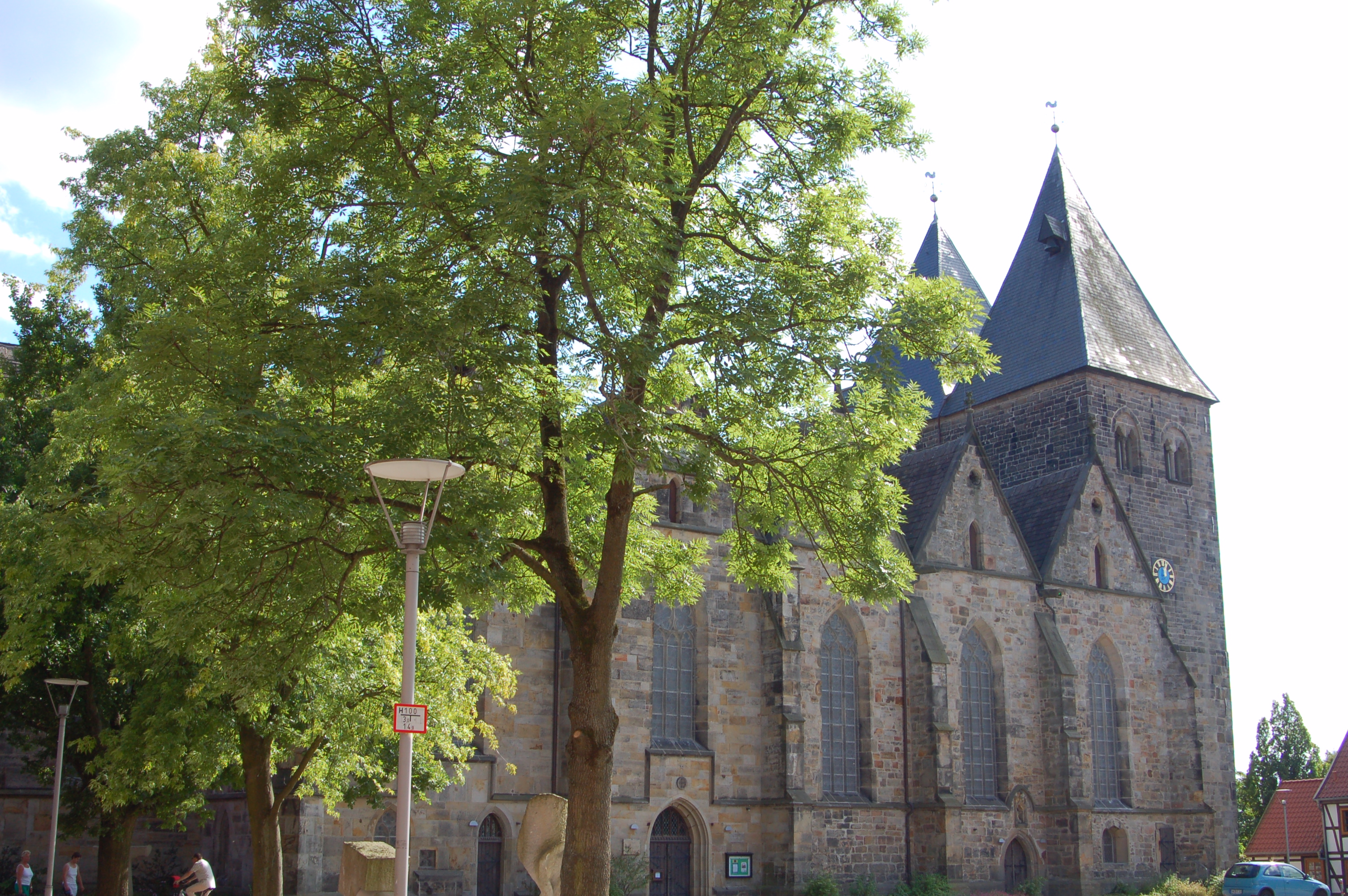 Stiftskirche St. Marien Obernkirchen, Kirchplatz, 31683 Obernkirchen